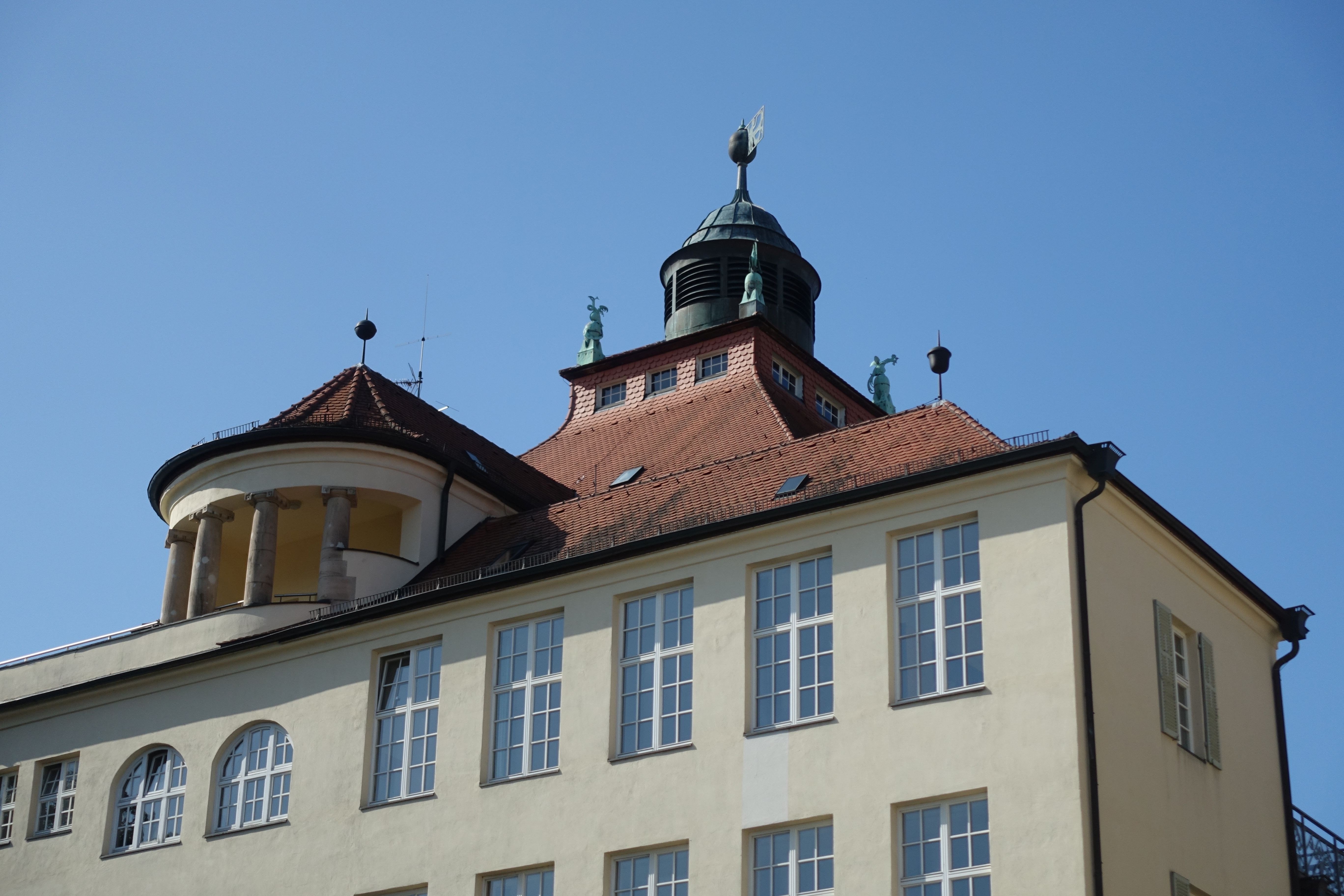 Linker Anbau der Heusteigschule in Stuttgart mit Säulenpavillon, dahinter: Dachaufbau des linken Kopfbaus mit einer bronzenen Wetterfahne mit der gestanzten Silhouette eines bandschwingenden (?) Putto und bronzenen Tierfiguren an den Ecken, die die vier Temperamente symbolisieren.